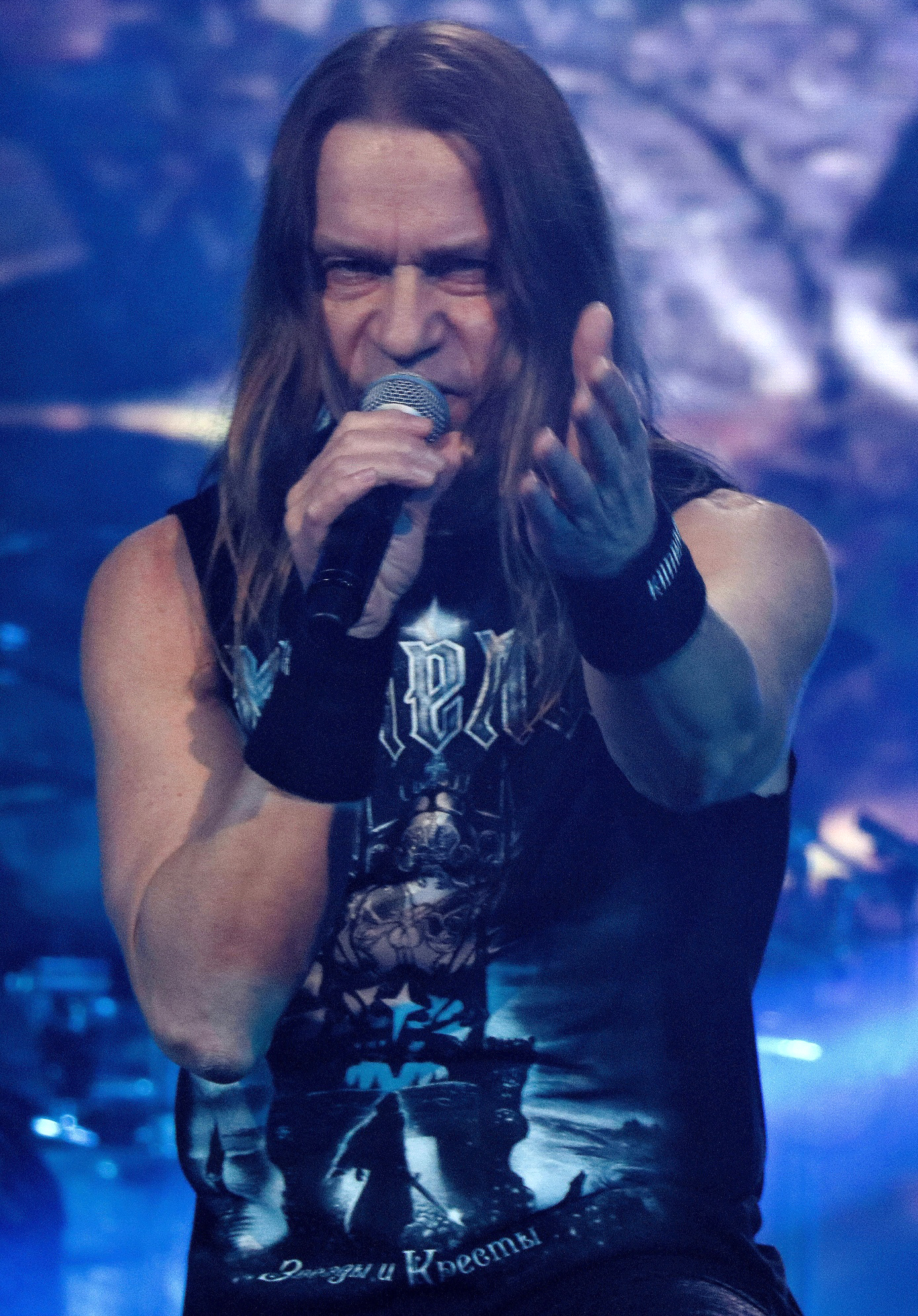 Валерий Кипелов на концерте посвященном выходу альбома "Звезды и кресты". Симферополь 13.09.2018